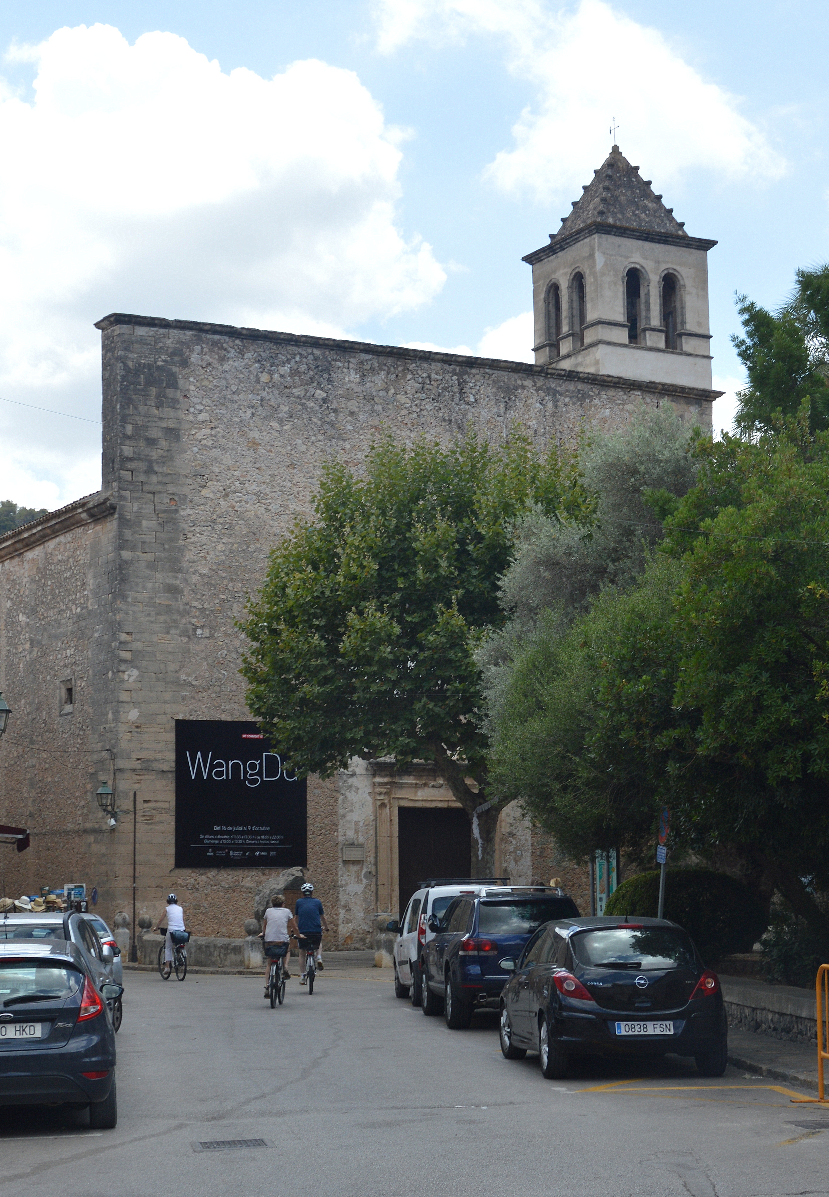 Ehemalige Kirche in Pollenca